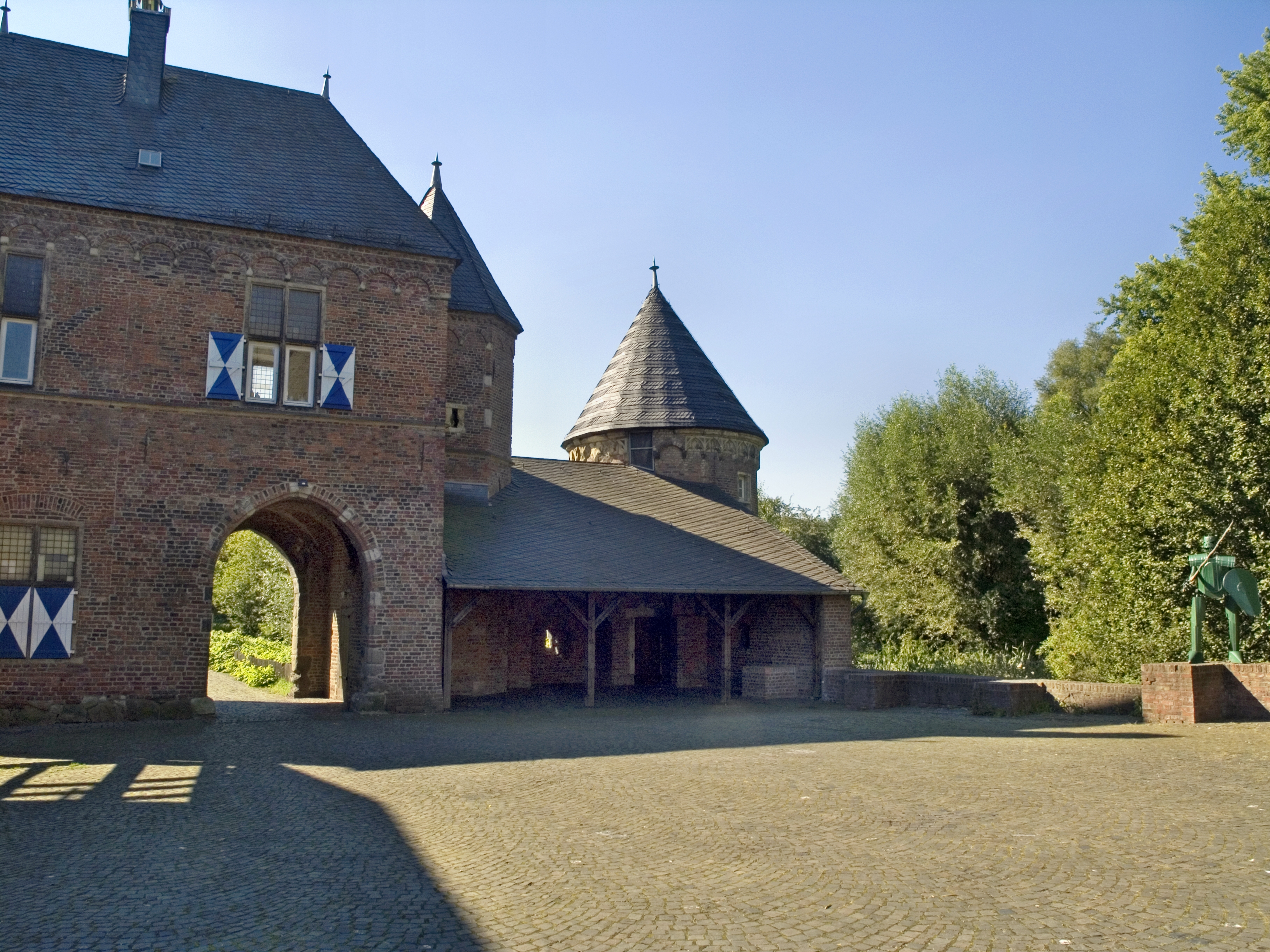 Северный Рейн-Вестфалия, Оберхаузен - замок Бург Фондерн